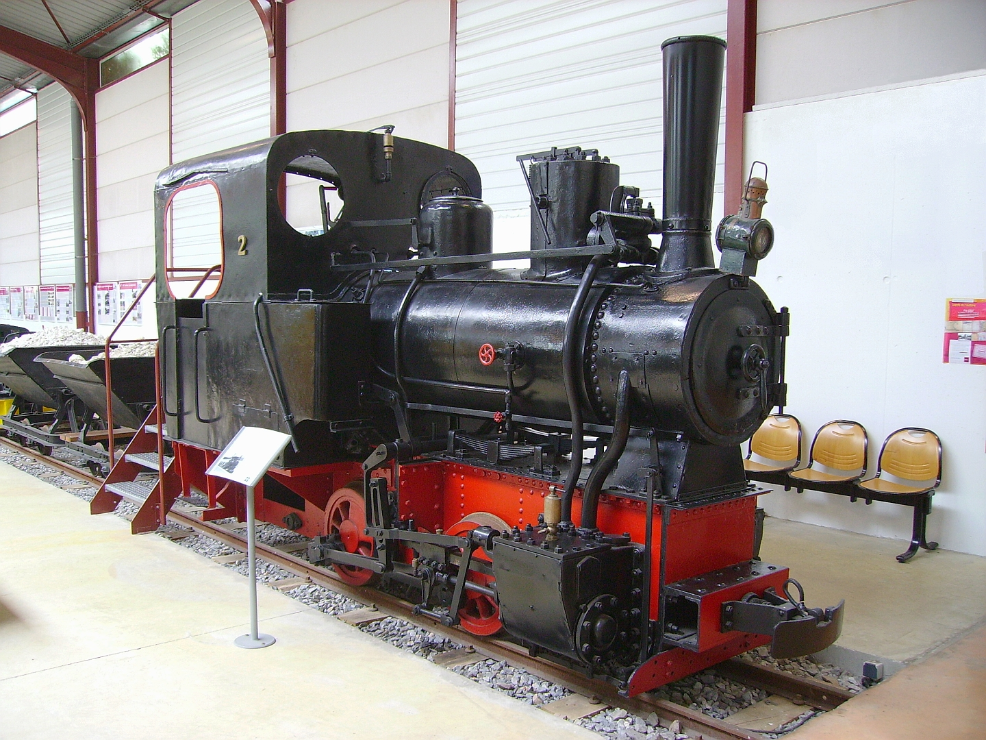 La 020 T N°2 (Neumeyer N°19 de 1922) du Chemin de fer Froissy-Cappy-Dompierre le 27 Mai 2007.